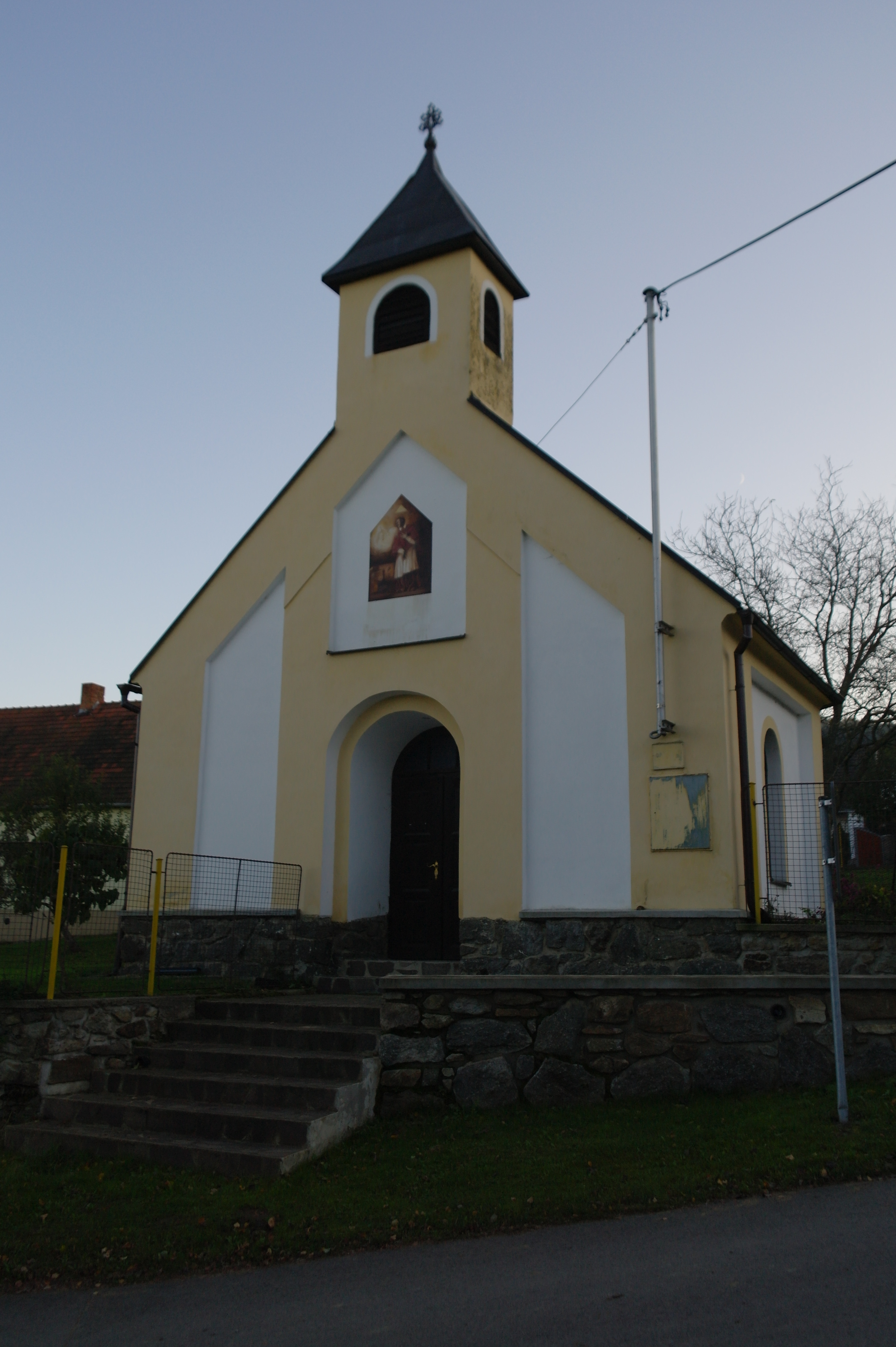 Kaple, vesnice Dolní Nakvasovice, součást obce Bušanovice.